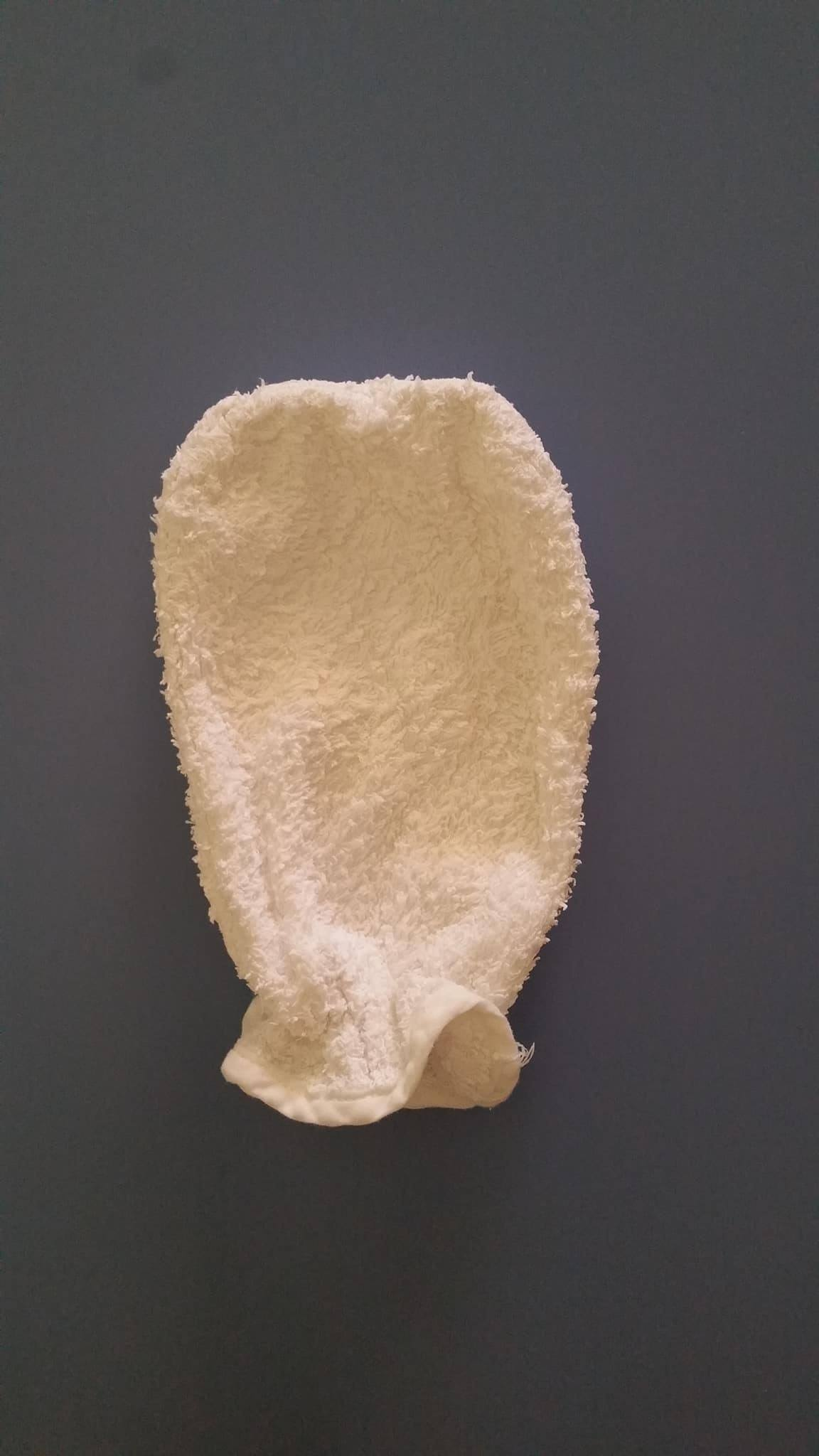 Λαβέτα χωρίς θήκη ξεχωριστή για τον αντίχειρα